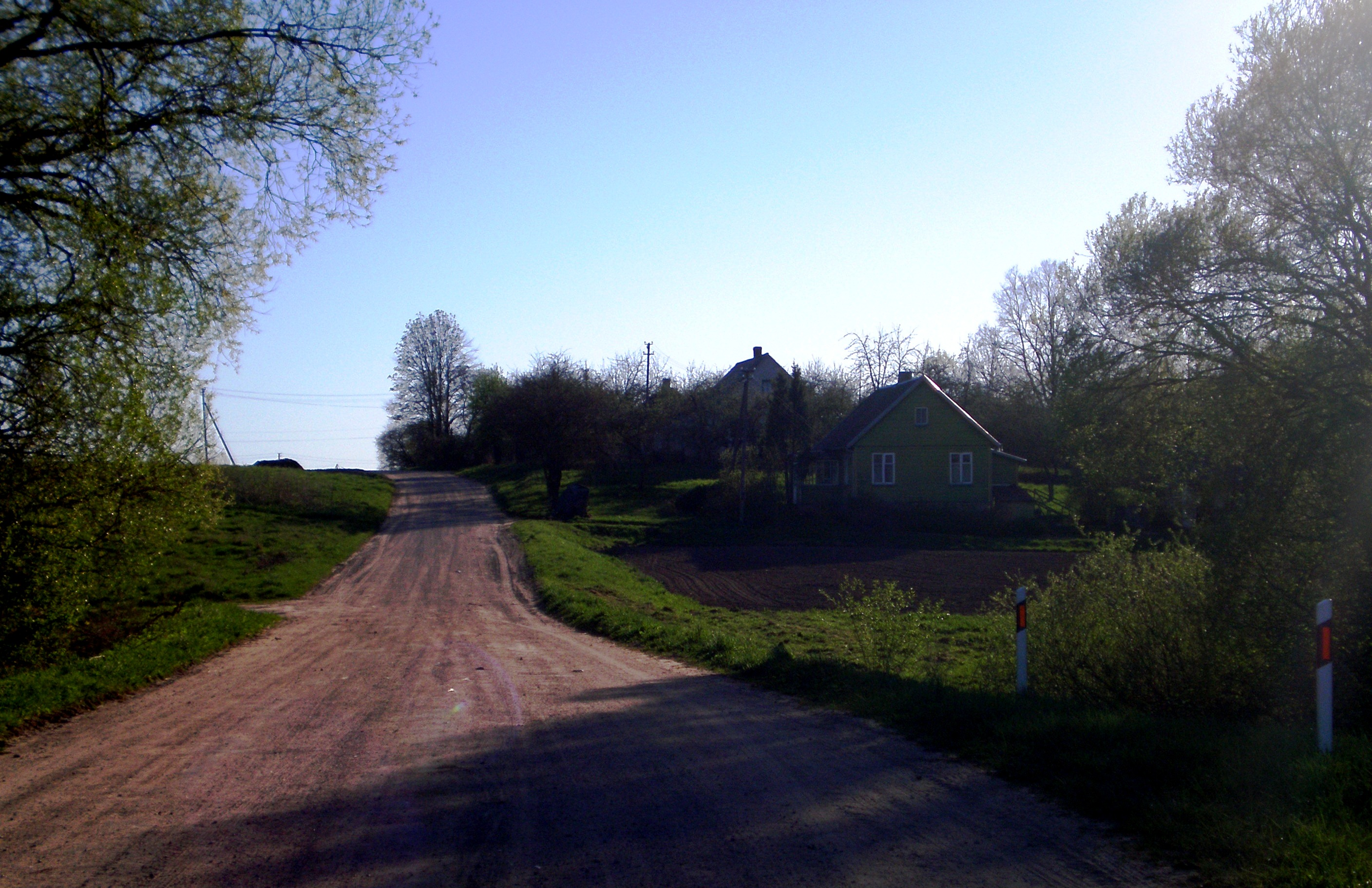 Lenčiai, Krakių sen., Kėdainių raj.